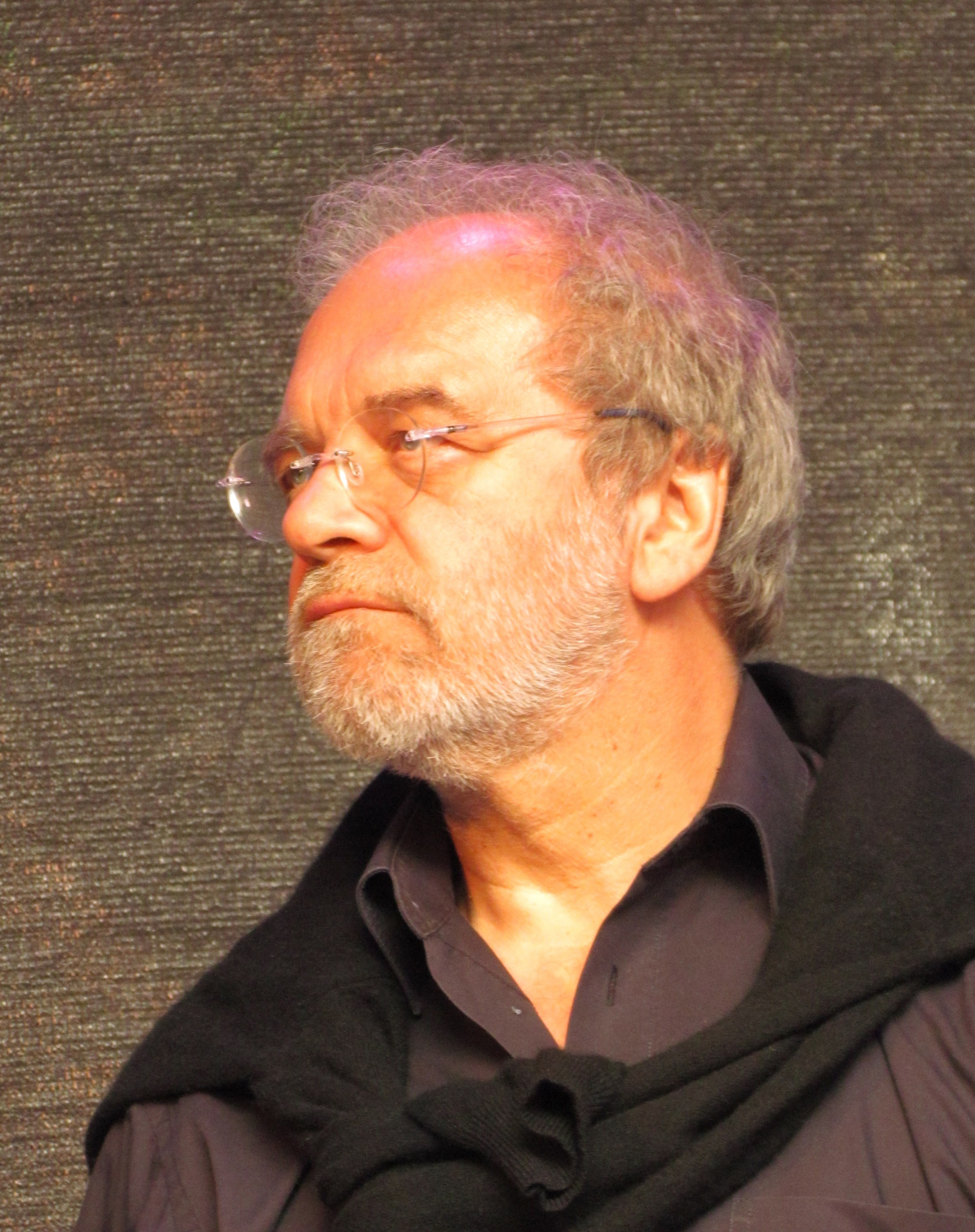 Bildinhalt: Peter Weiss bei den 17. Jazztagen Idar-Oberstein 2012 Aufnahmeort: Idar-Oberstein, Deutschland